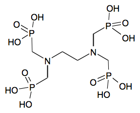 EDTMP, Ethylendiamin-tetra(methylenphosphonsäure)